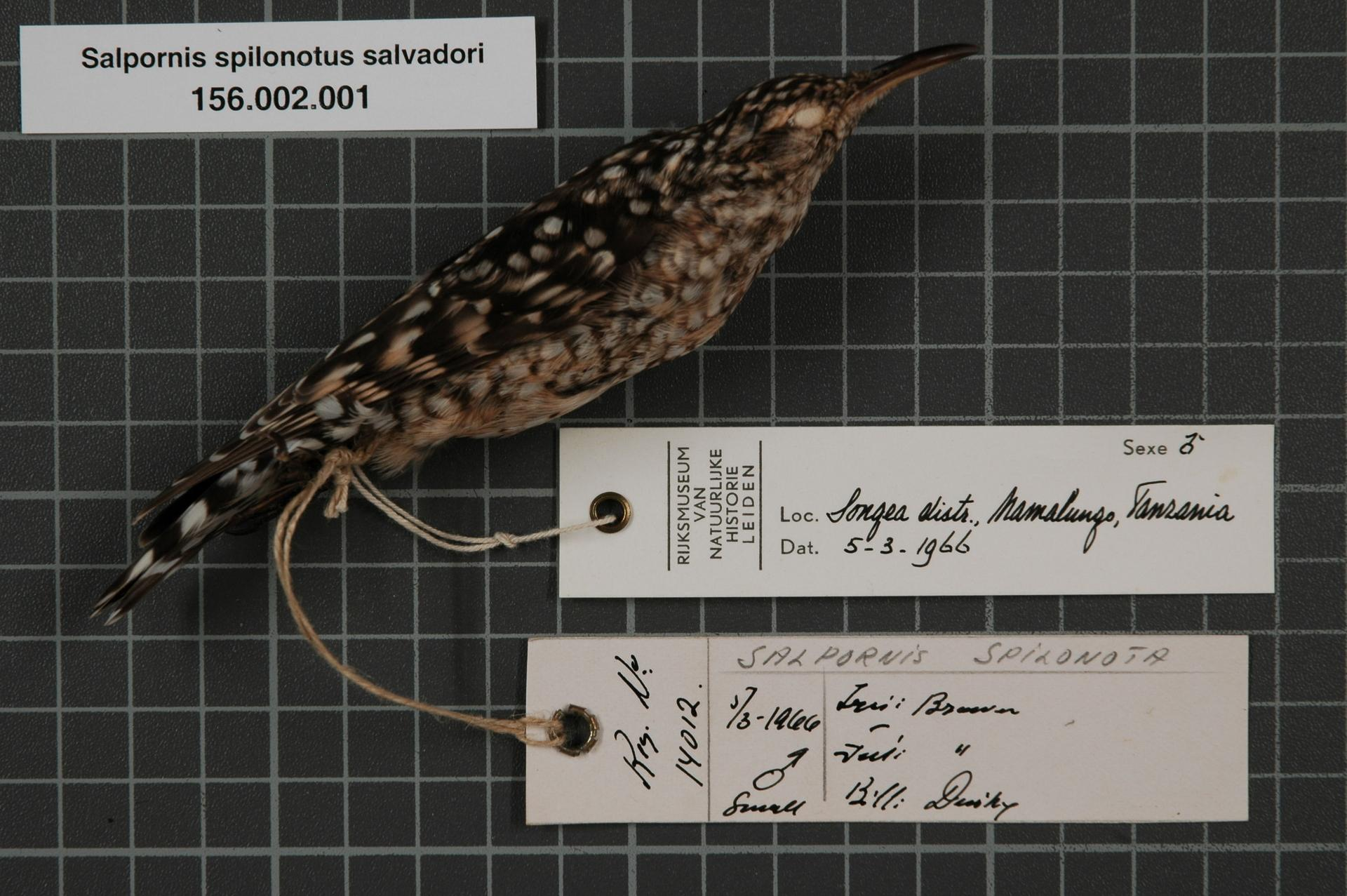 Salpornis spilonotus salvadori (Bocage, 1878)